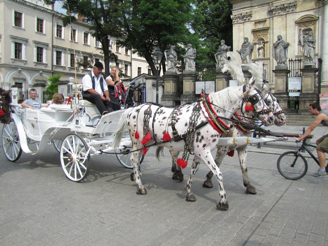 KRAKOWSKA DOROŻKA.